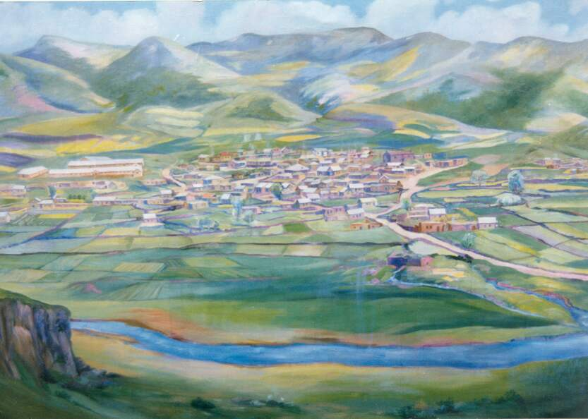 Ապարանի շրջանի Զովունի գյուղի գեղարվեստական նկար